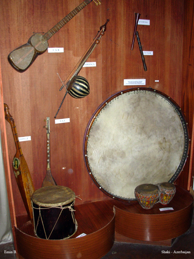 Азербайджанские национальные музыкальные инструменты